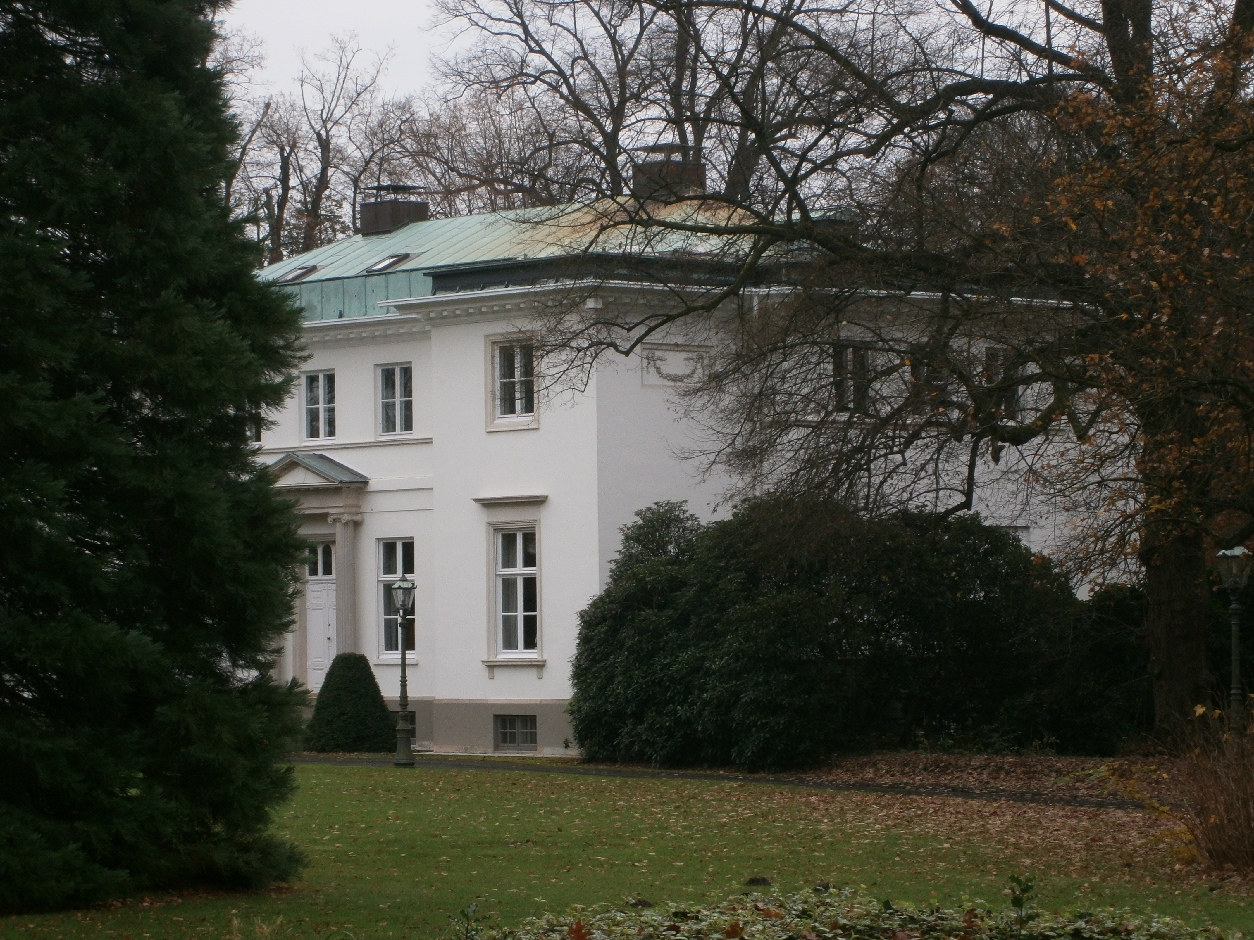 Das Landhaus P. Godeffroy an der Elbchaussee 547, breitgelagerter zweigeschossiger Putzbau auf Sandsteinsockel. Siebenachsige Straßenfassade mit zwei einachsigen stark vorspringenden Seitenrisaliten. In den Seitenfronten dreiachsige Mittelrisalite. Die Elbfassade mit dreiachsigem Mitteltrakt und stark vorspringenden zweiachsigen Seitenrisaliten. Attika und niedriges kupfergedecktes Walmdach. Erbaut 1789 und 1792 von C. F. Hansen (Weißes Haus)This is a photograph of an architectural monument.